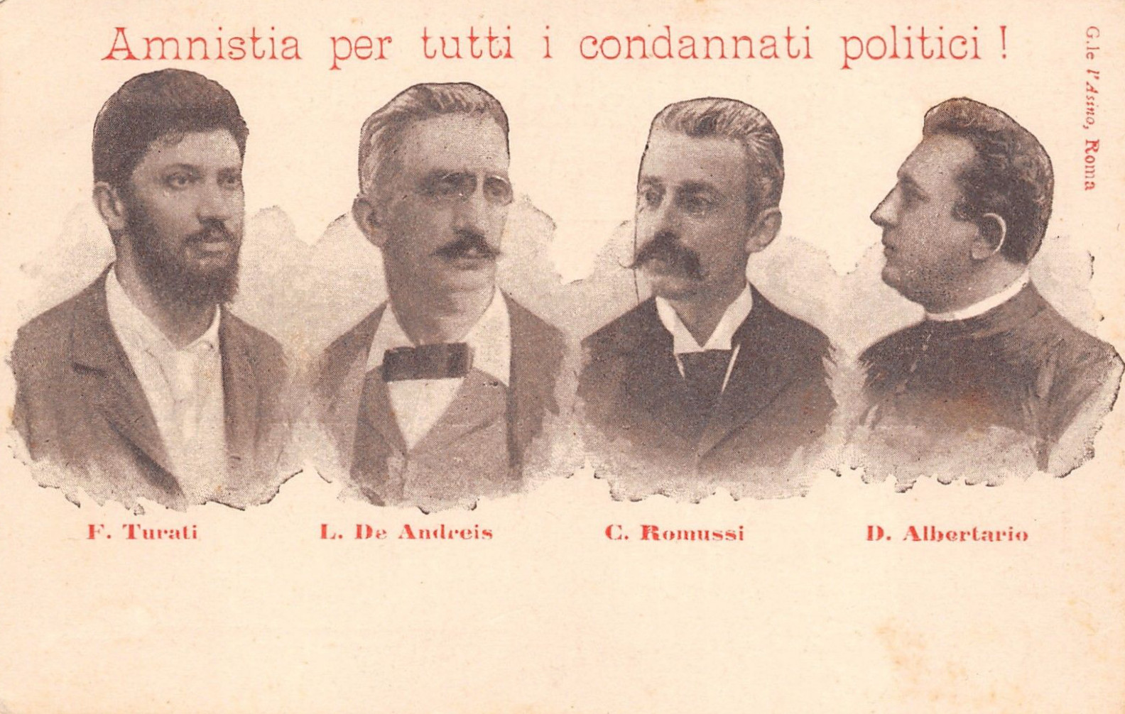 Cartolina con richiesta di amnistia per i condannati politici per i moti del 1898